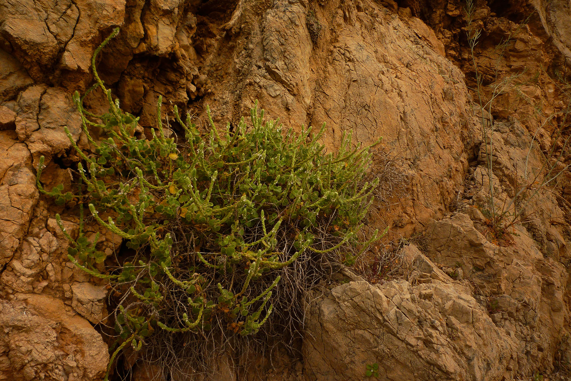 Lafuentea rotundifolia, planta endémica del sureste de España, en el Monte de San Julián de Cartagena (España).